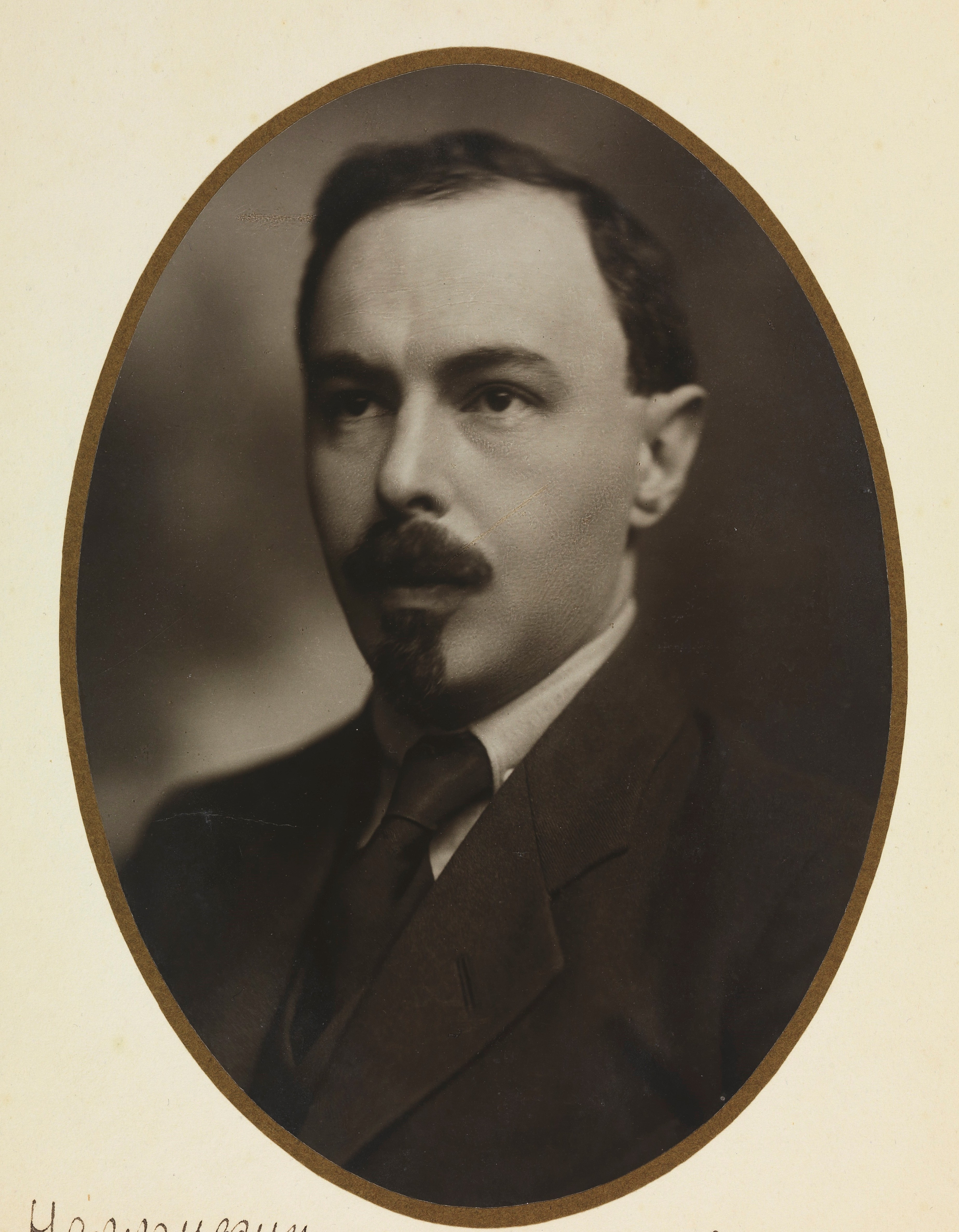 Sokolnikov, folkekommissær for Finansdepartementet i Sovjetunionen. Depicted person: Sokolnikov Depicted place: Russland, Moskva